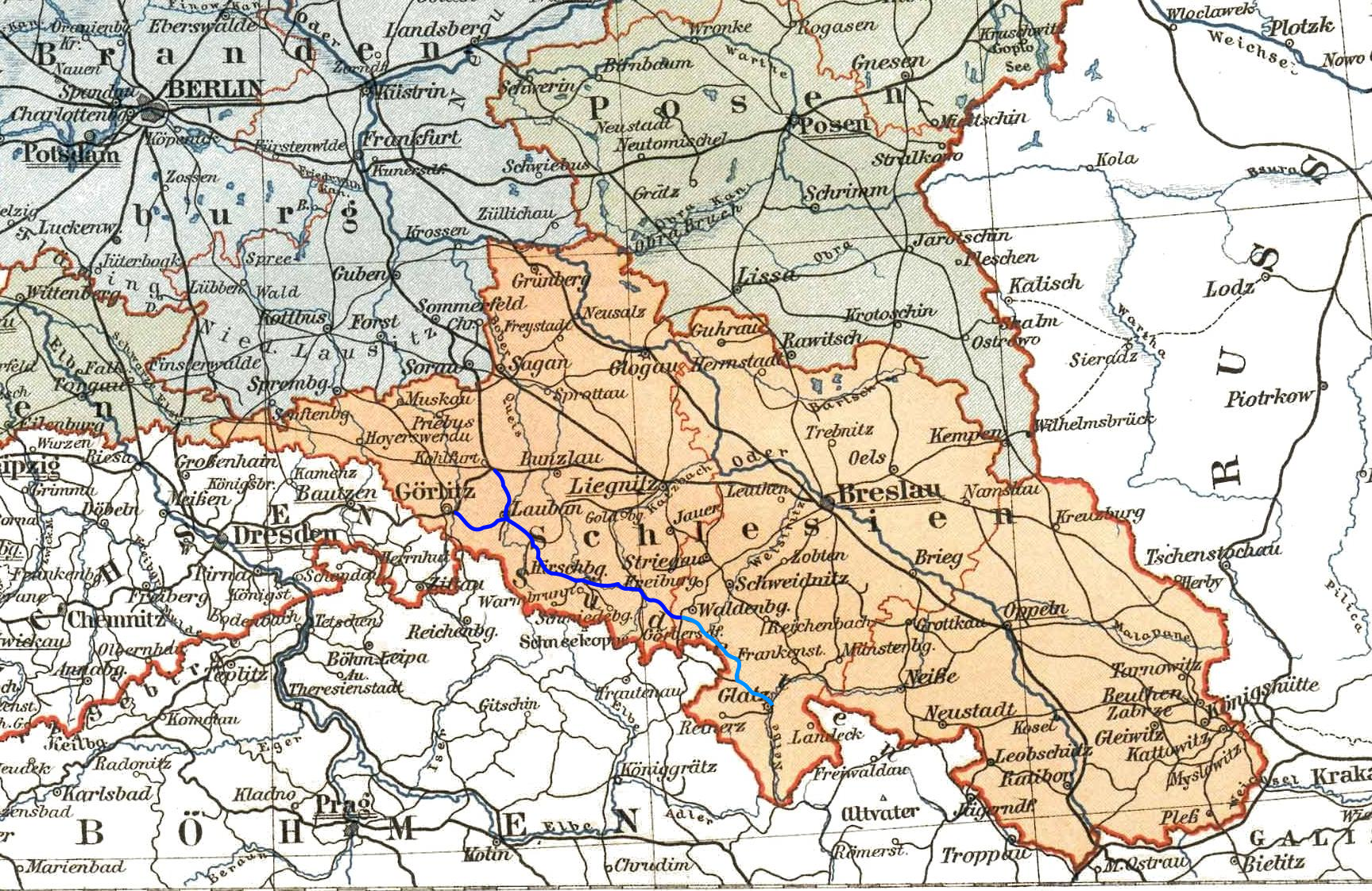 Przebieg Śląskiej Kolei Górskiej na tle politycznej mapy Prus sprzed 1905 r.